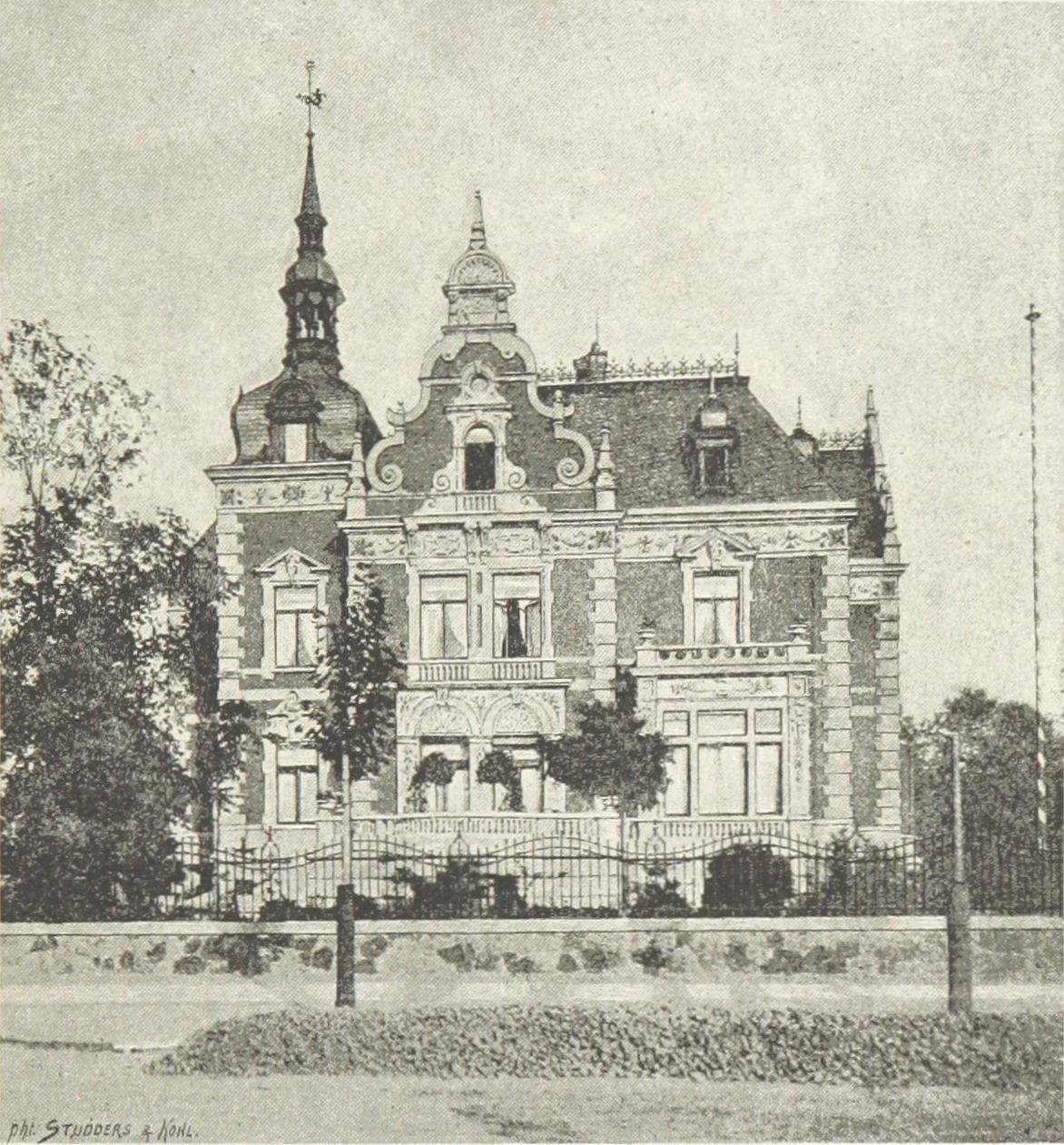 Villa Wölker in der Leipziger Karl-Tauchnitz-Straße 15 (alte Hausnummer 31). Erbaut 1888 nach Plänen von Max Pommer für Generalkonsul Wölker Ansicht